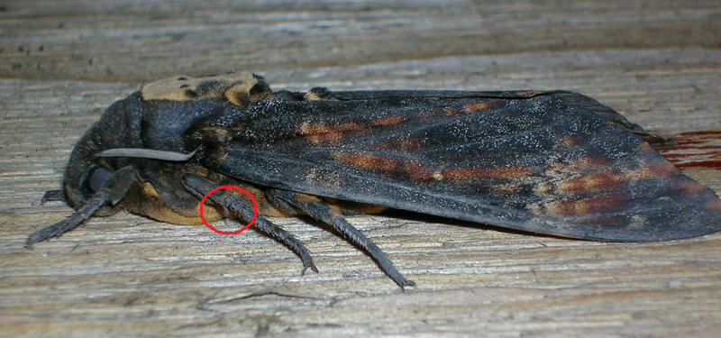 spore van de doodshoofdvlinder aangegeven.